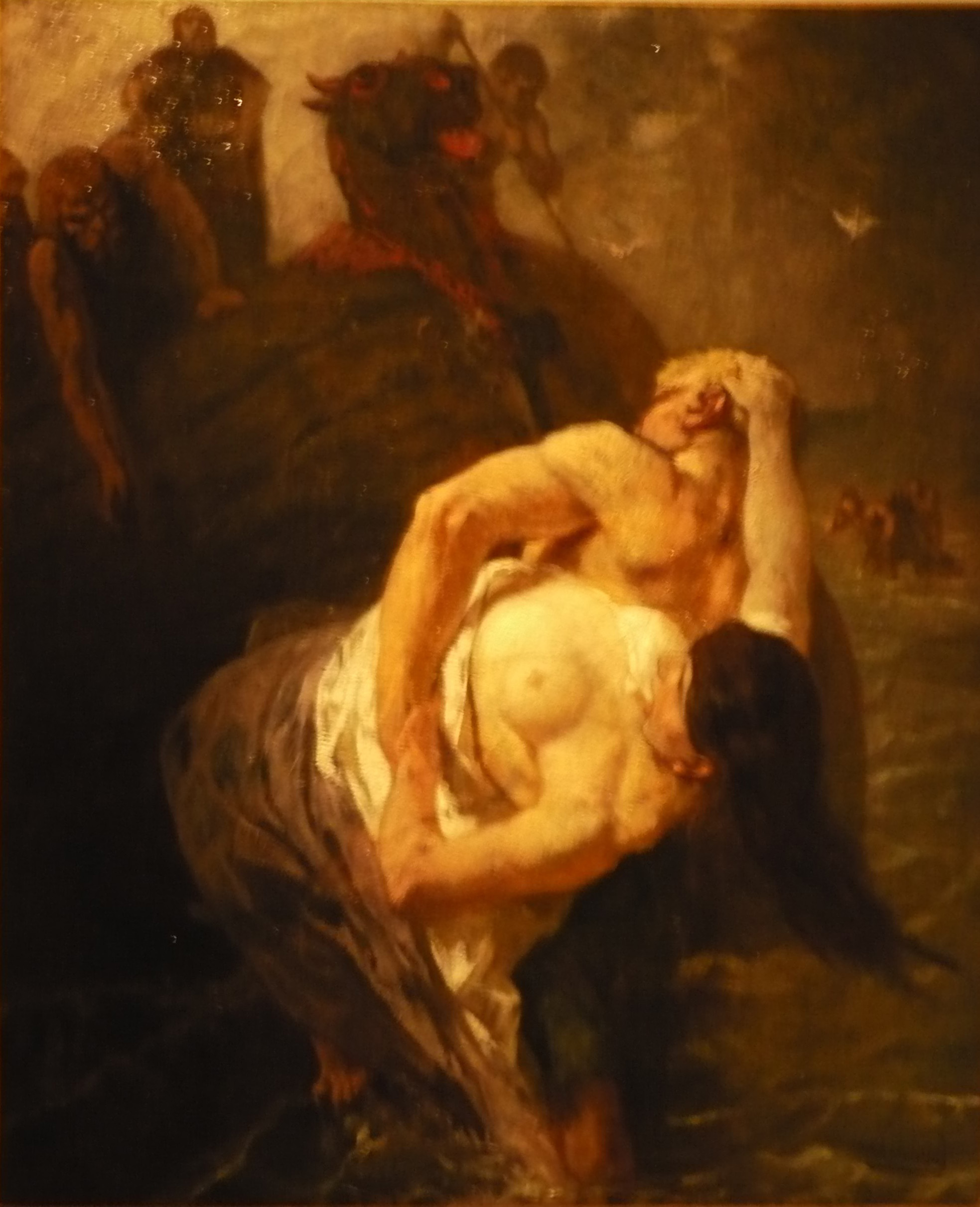 « Pirates normands au IXème siècle » (esquisse). Peinture d'Evariste-Vital Luminais (Nantes, 1822 - Paris, 1896). Musée de Melun - Maison de la vicomté.